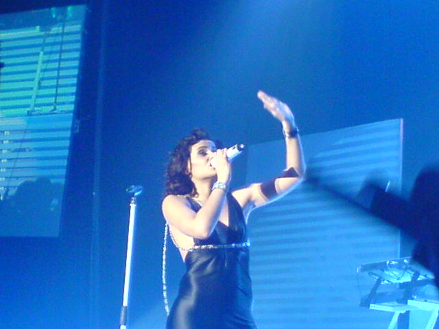 Nelly Furtado beim Konzert in München